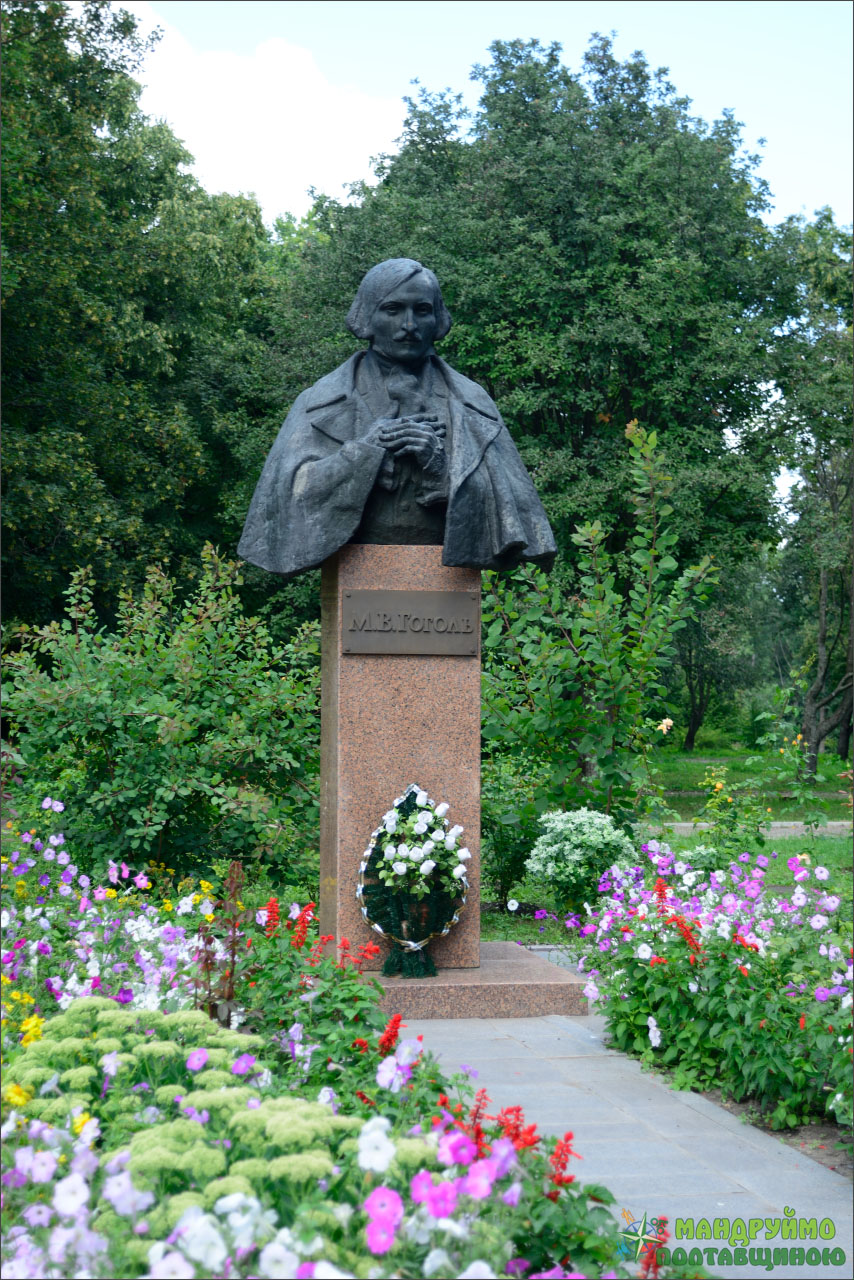 Пам'ятник-бюст М. В. Гоголю, с. Гоголево, заповідник-музей М. В. Гоголю